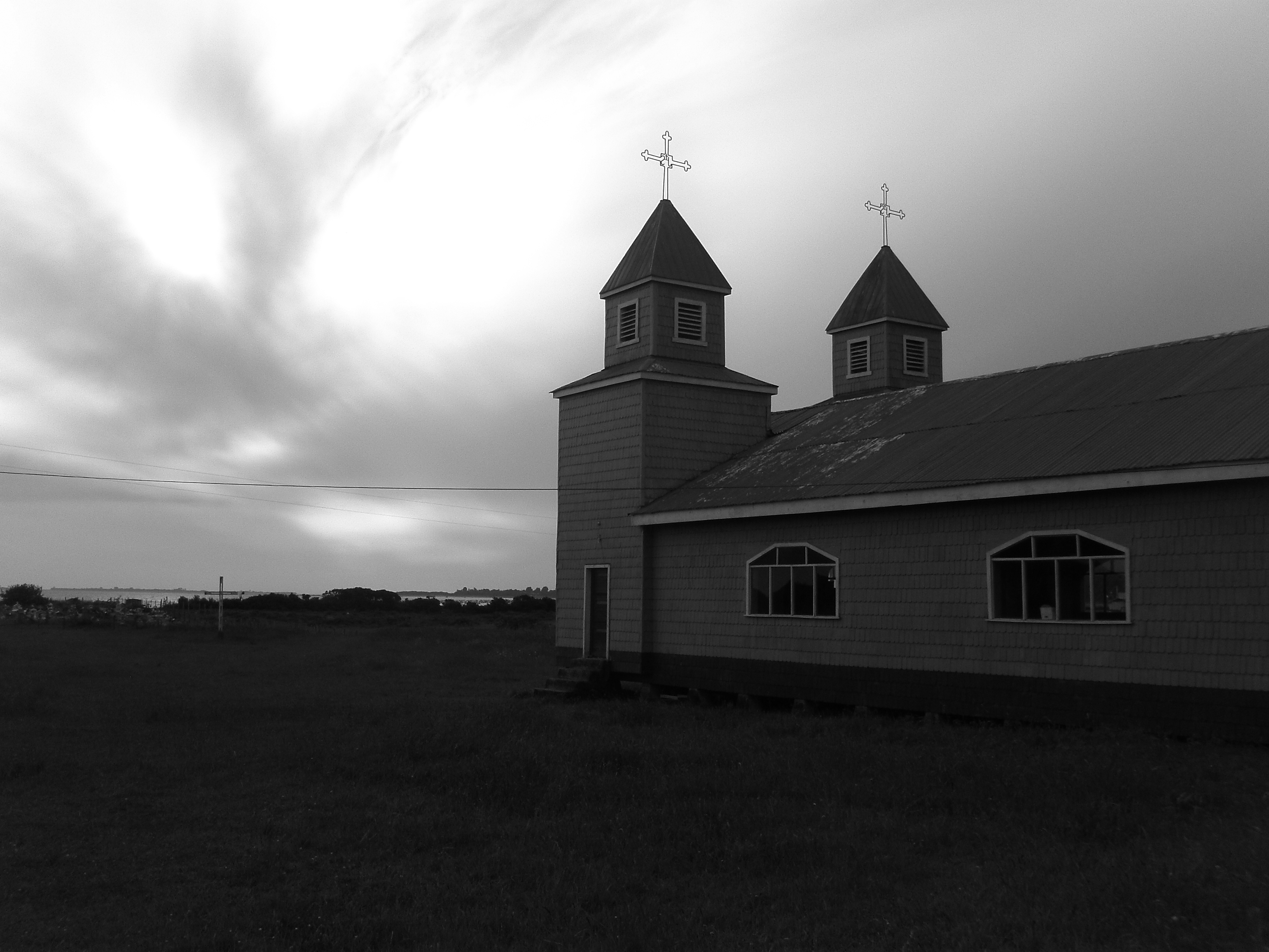 Isla puluqui, iglesia llaicha